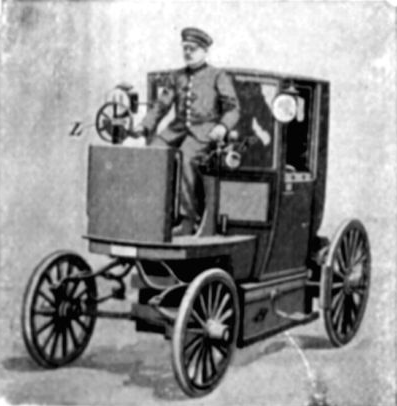 Elektrische Droschke (Paris). L Lenkrad, F Fahrschalthebel, B Batterie, Motoren hinter dem Wagenkasten; stündlich bis 25 km